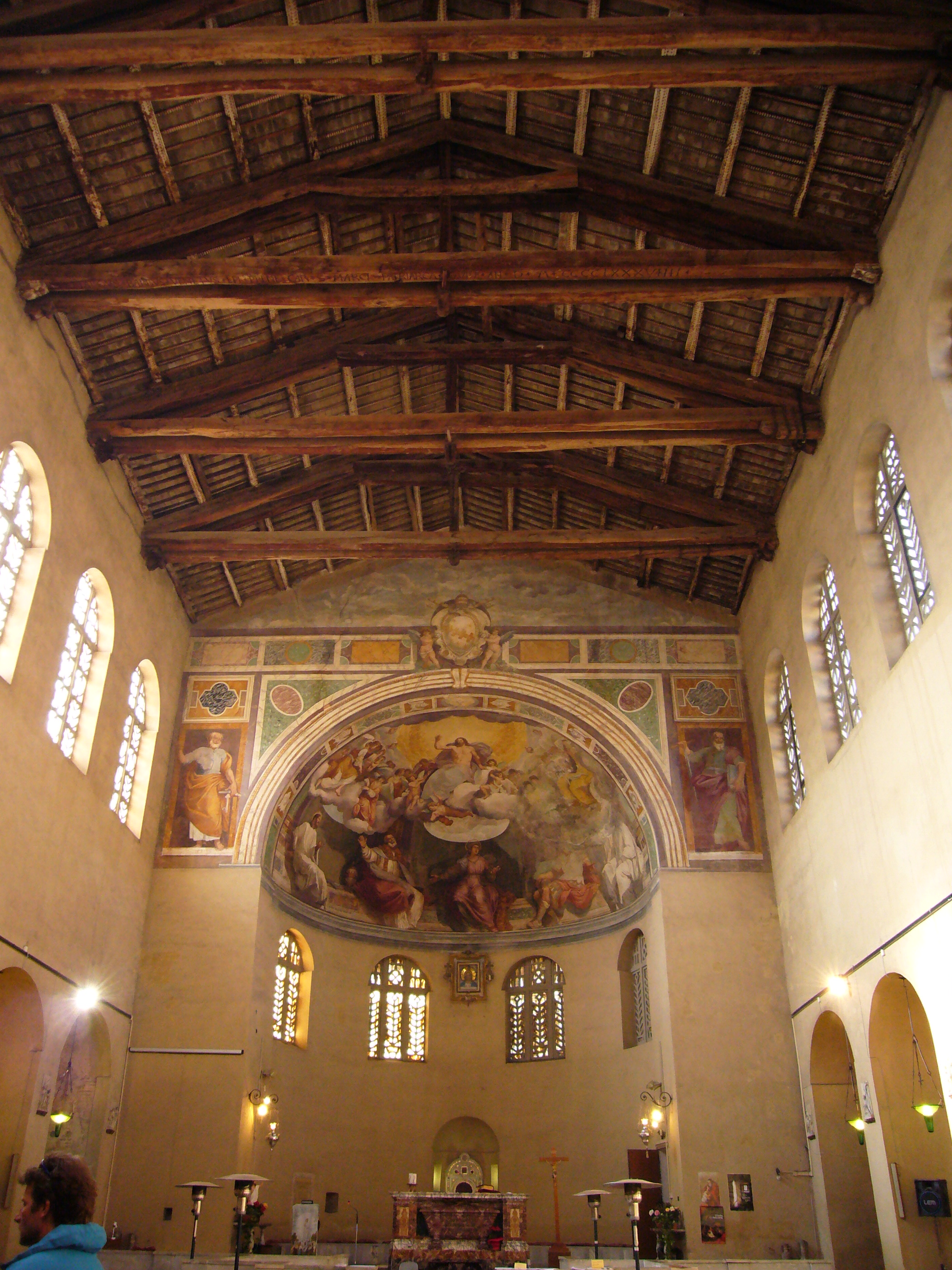 Santa Balbina a Roma: interno. Foto by Lalupa.